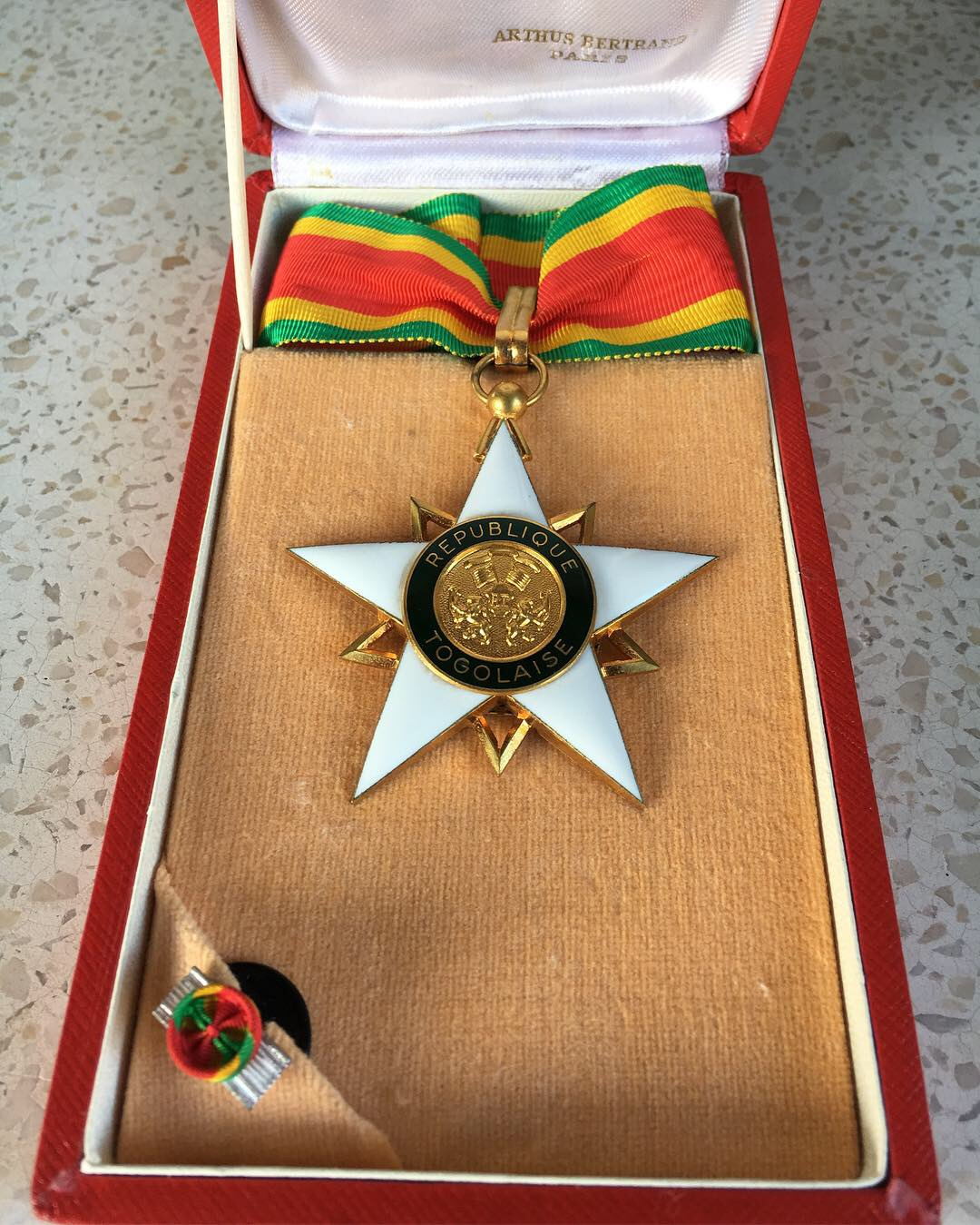 Commandeur de l'Ordre du Mono, République Togolaise. Collections AEA.